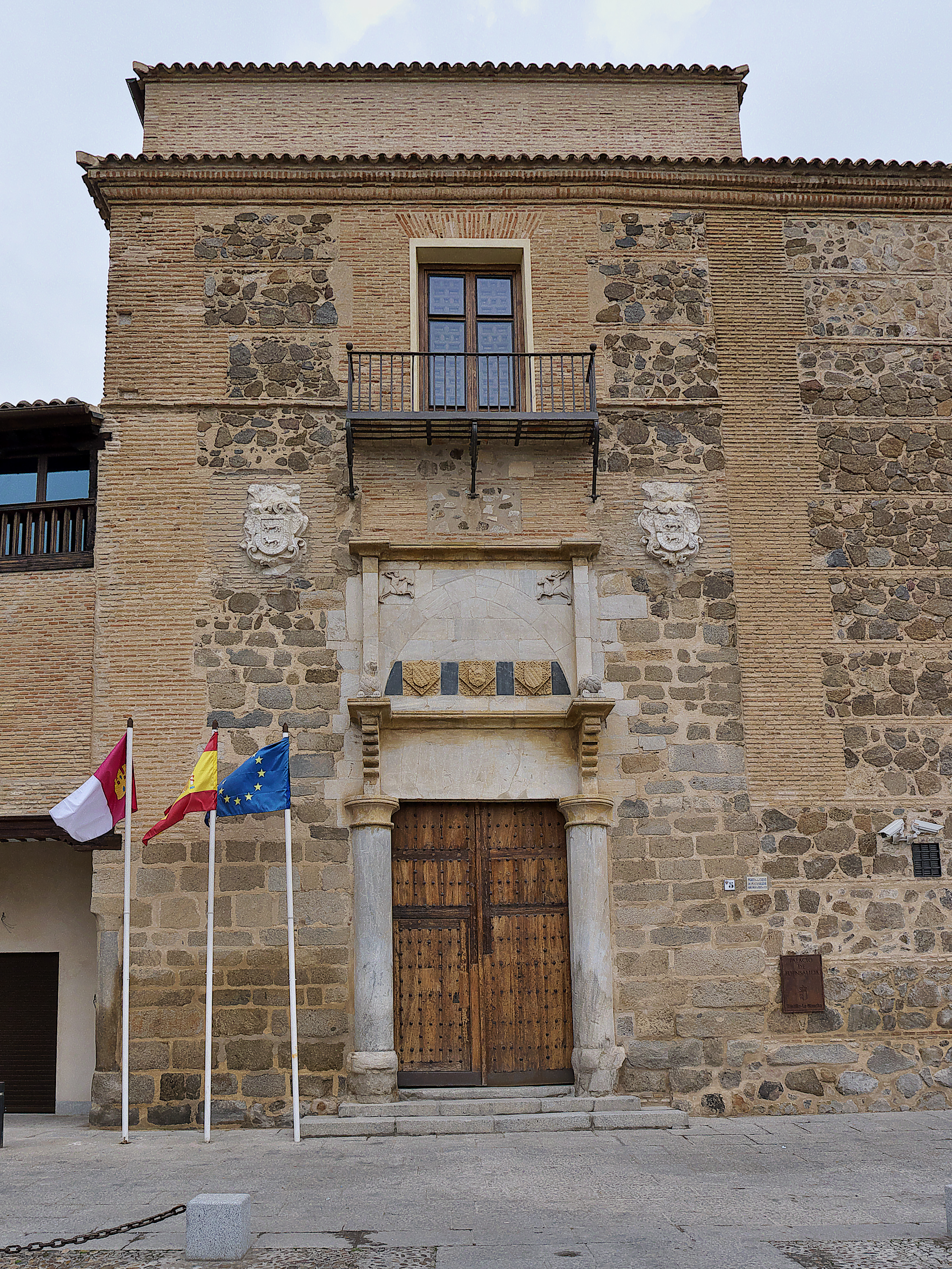 Ejemplar de la arquitectura mudéjar civil en Toledo (1440). Mandado a construir por el primer señor de Fuensalida, Pedro López de Ayala.